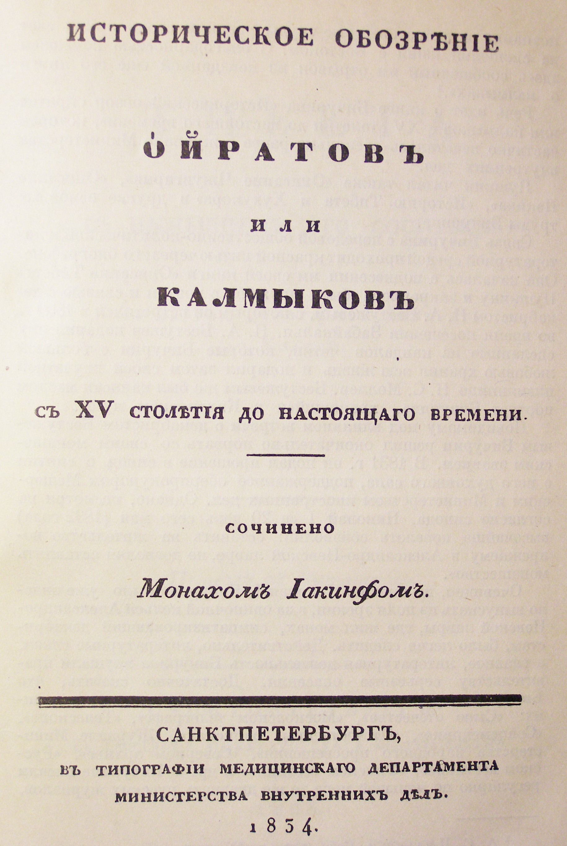 Титульный лист "Исторического обозрения ойратов или калмыков" Н.Я. Бичурина